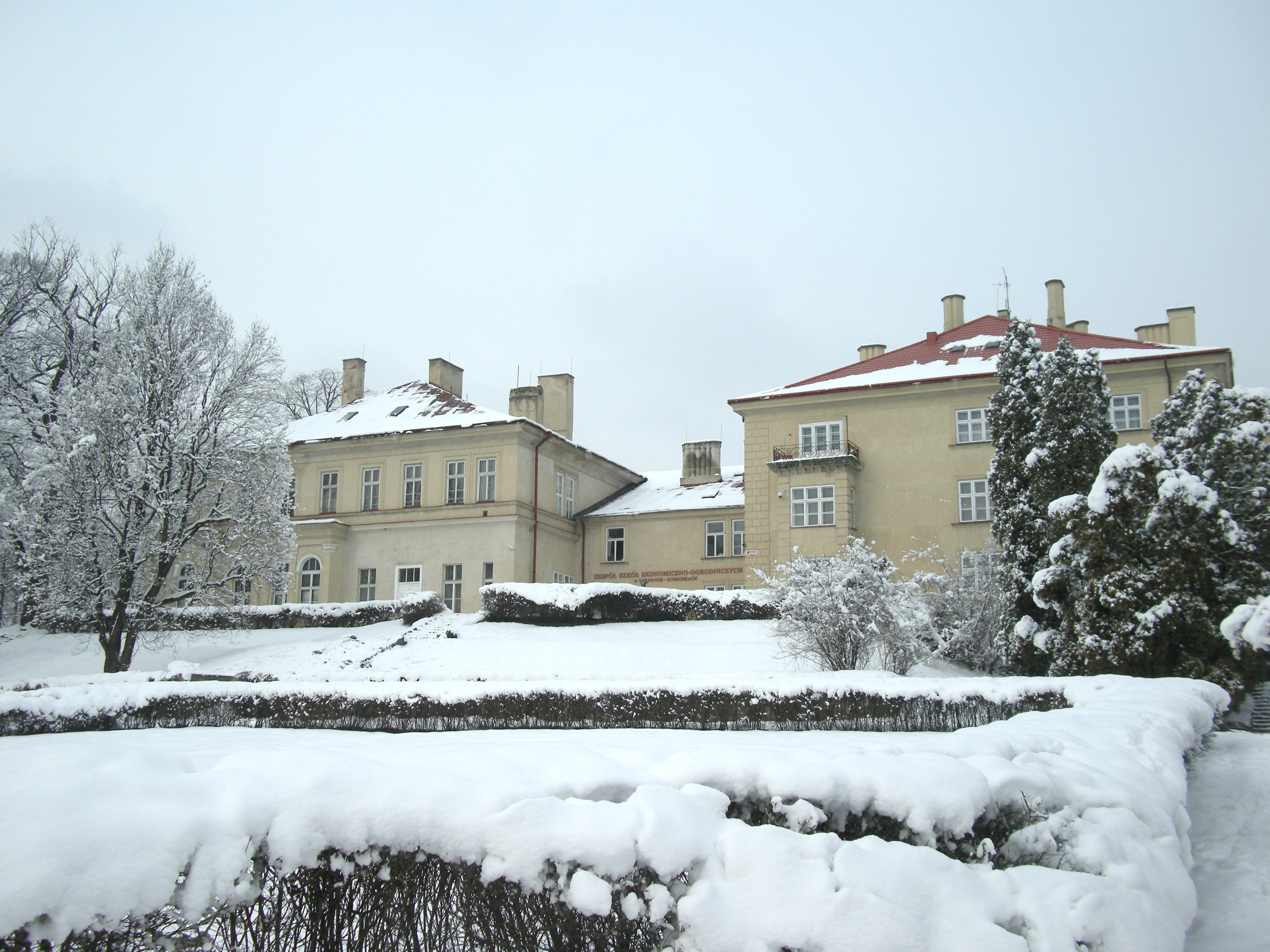 Dawny pałac Sanguszków w Tarnowie-Gumniskach. Obecnie Zespół Szkół Ekonomiczno-Ogrodniczych